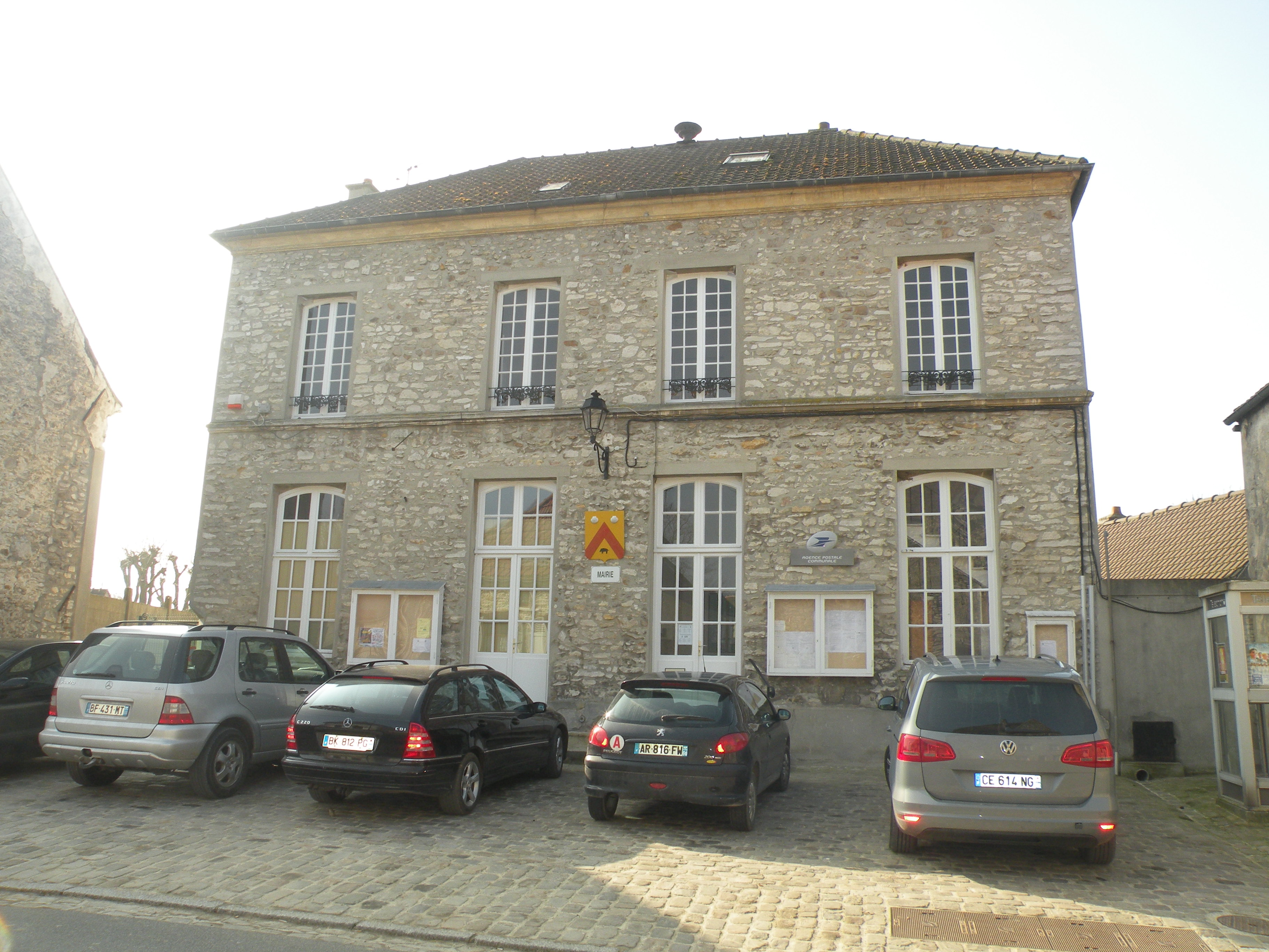 Baron mairie